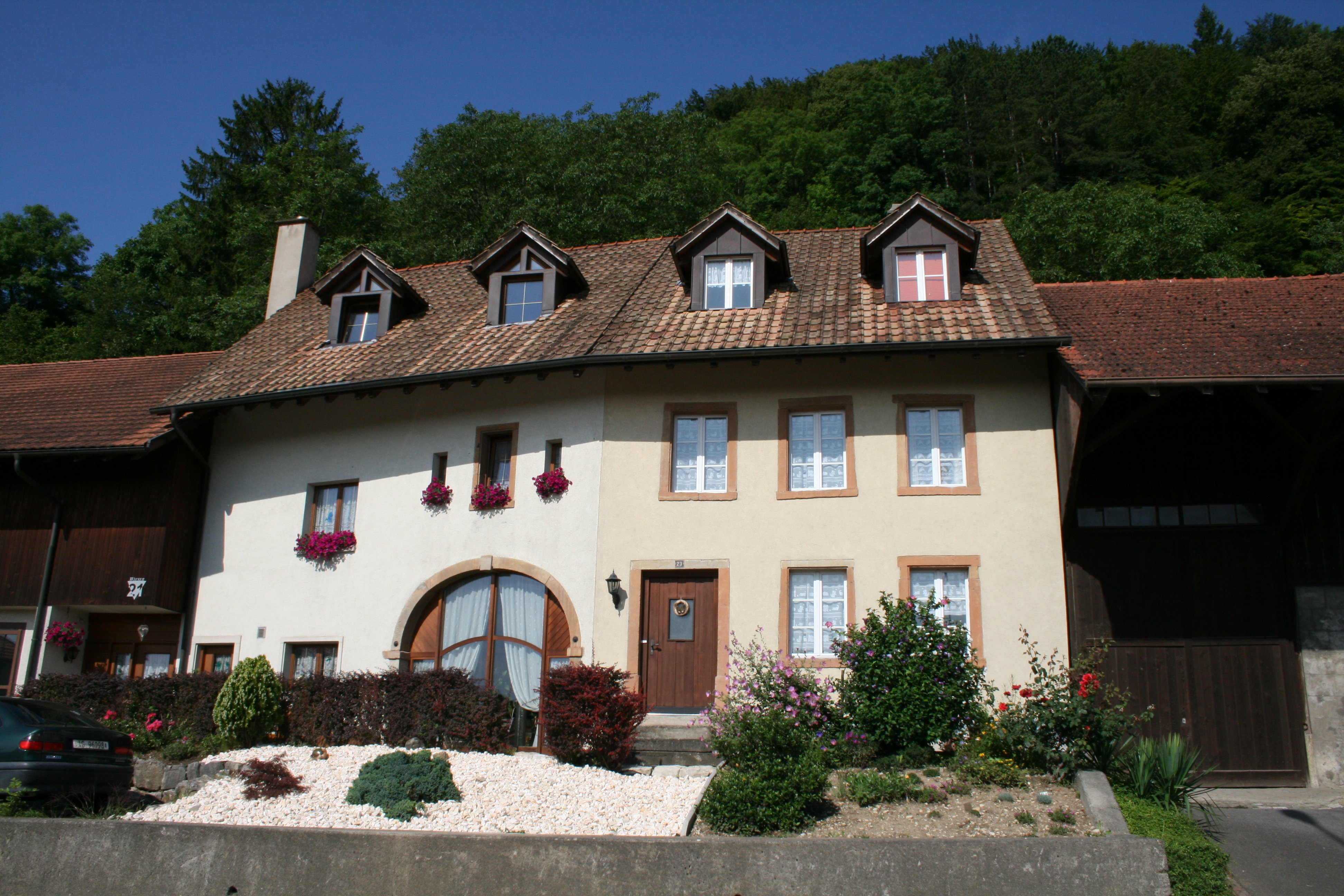 Zwei Hüser am Fuess vom Geissbärg, Villige AG, Schwiiz